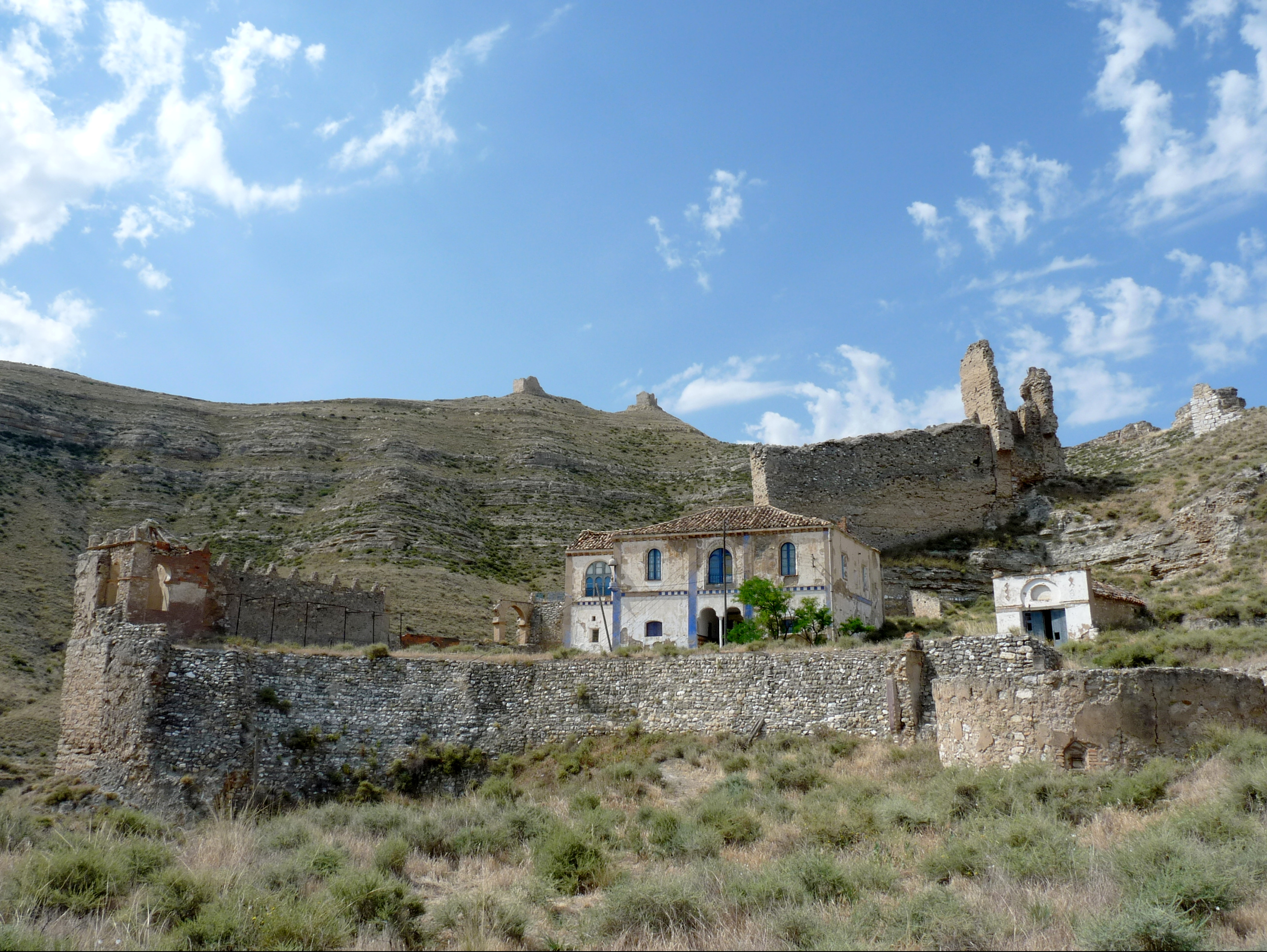 Rueda de Jalón - Castillo - Vista